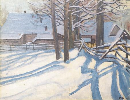 Zima na wsi 1931 olej, tektura 30 x 39,5 cm sygnowany po prawej stronie u dołu: KLAR. 1931.